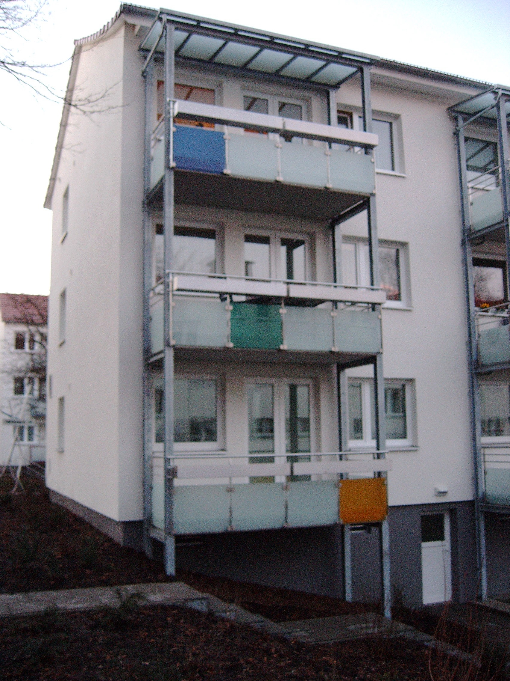 Building in Walle, Bremen